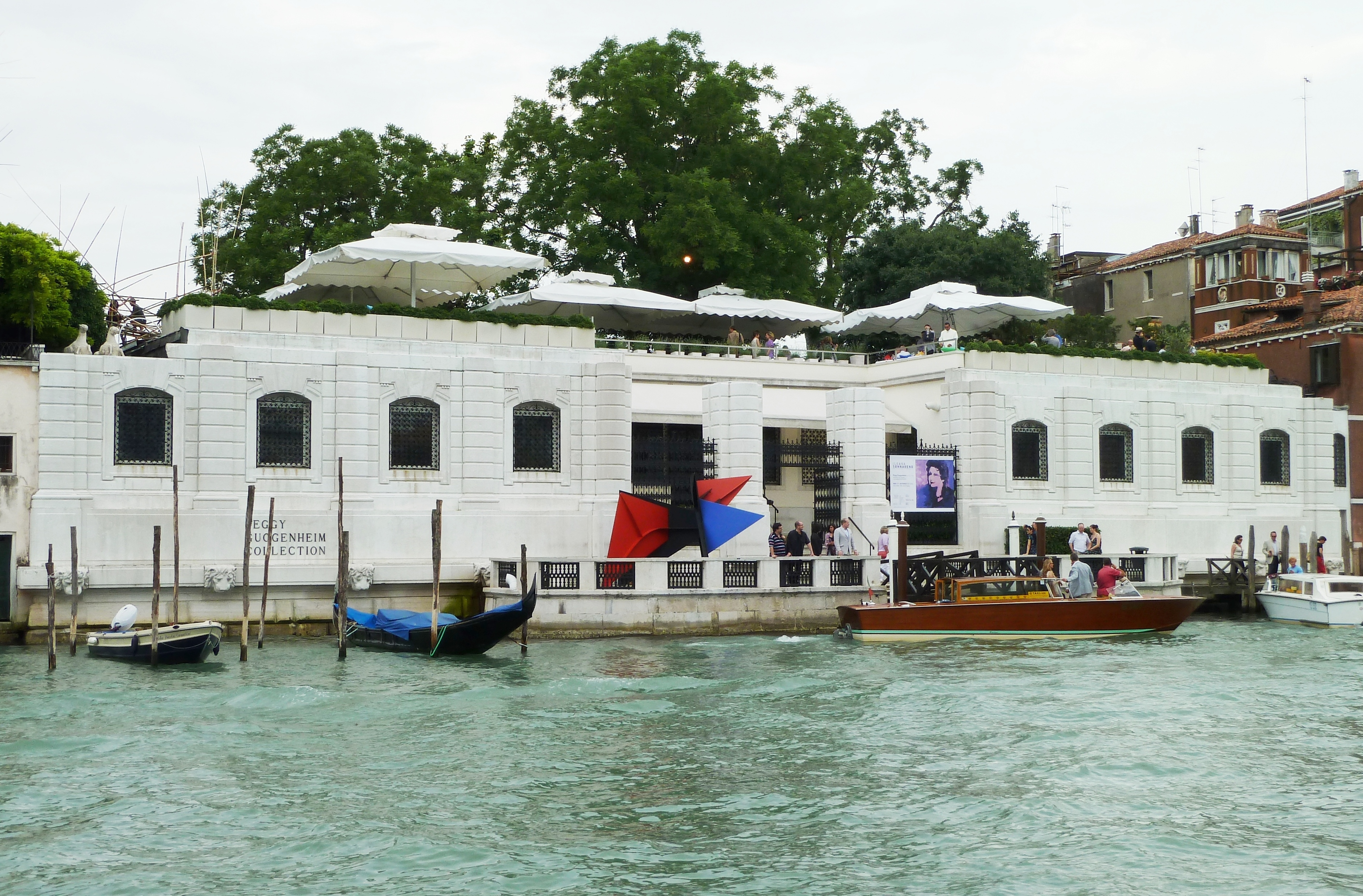 Museo Guggenheim (Venice)